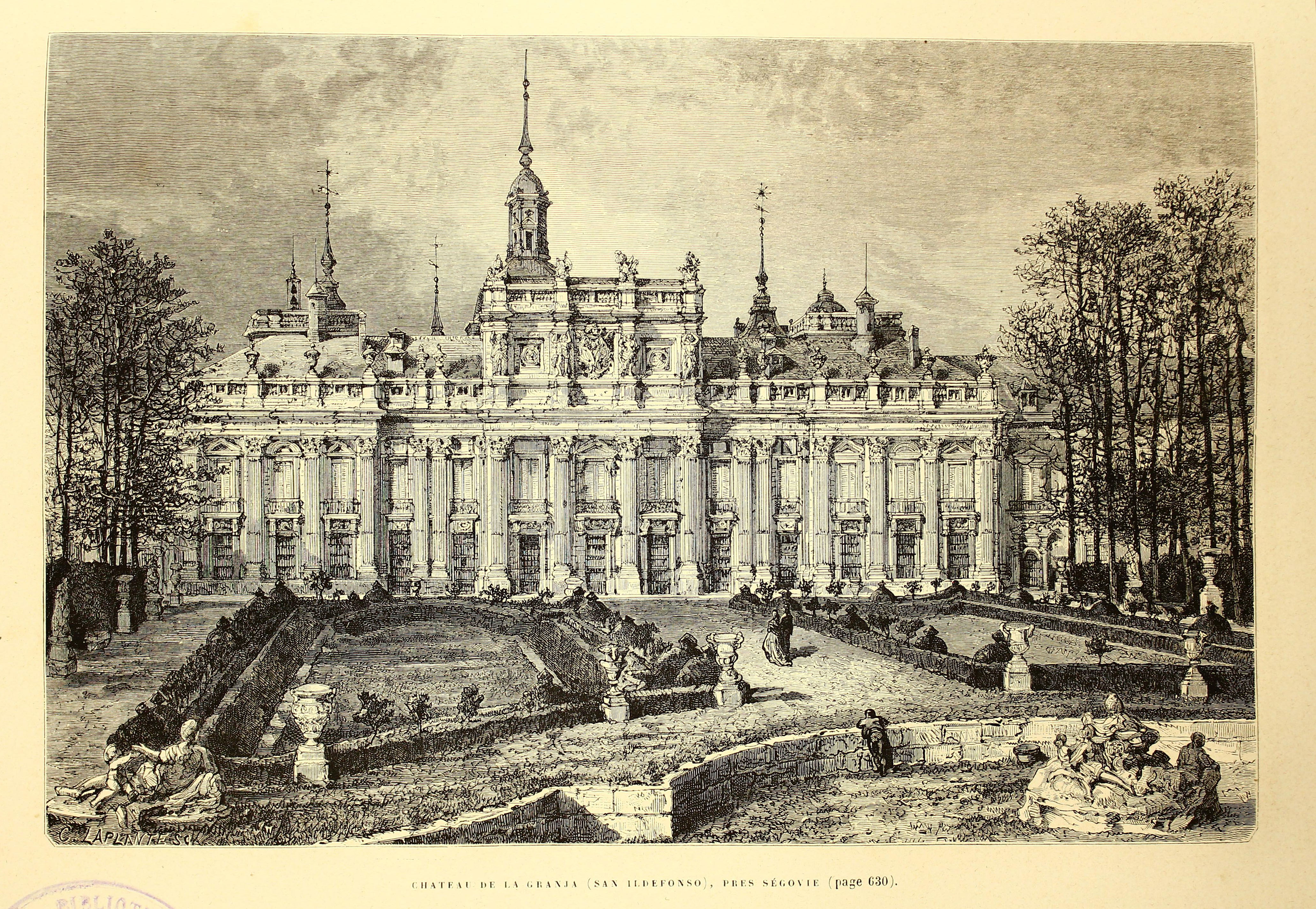 Autor: Davillier, Jean Charles, barón, 1823-1883 Descripción bibliográfica: L'Espagne / par Le Baron CH. Davillier ; ilustrée de 309 gravures dessinées su bois par Gustave Doré. - Paris : Librairie Hachette, 1874. - 799 p. : il. Materia: España- Geografía Materia: España- Usos y costumbres Ilustrador: Doré, Gustave, 1832-1883 Editor: Libreria Hachette Lugar de impresión: Francia, París Localización: Libro completo